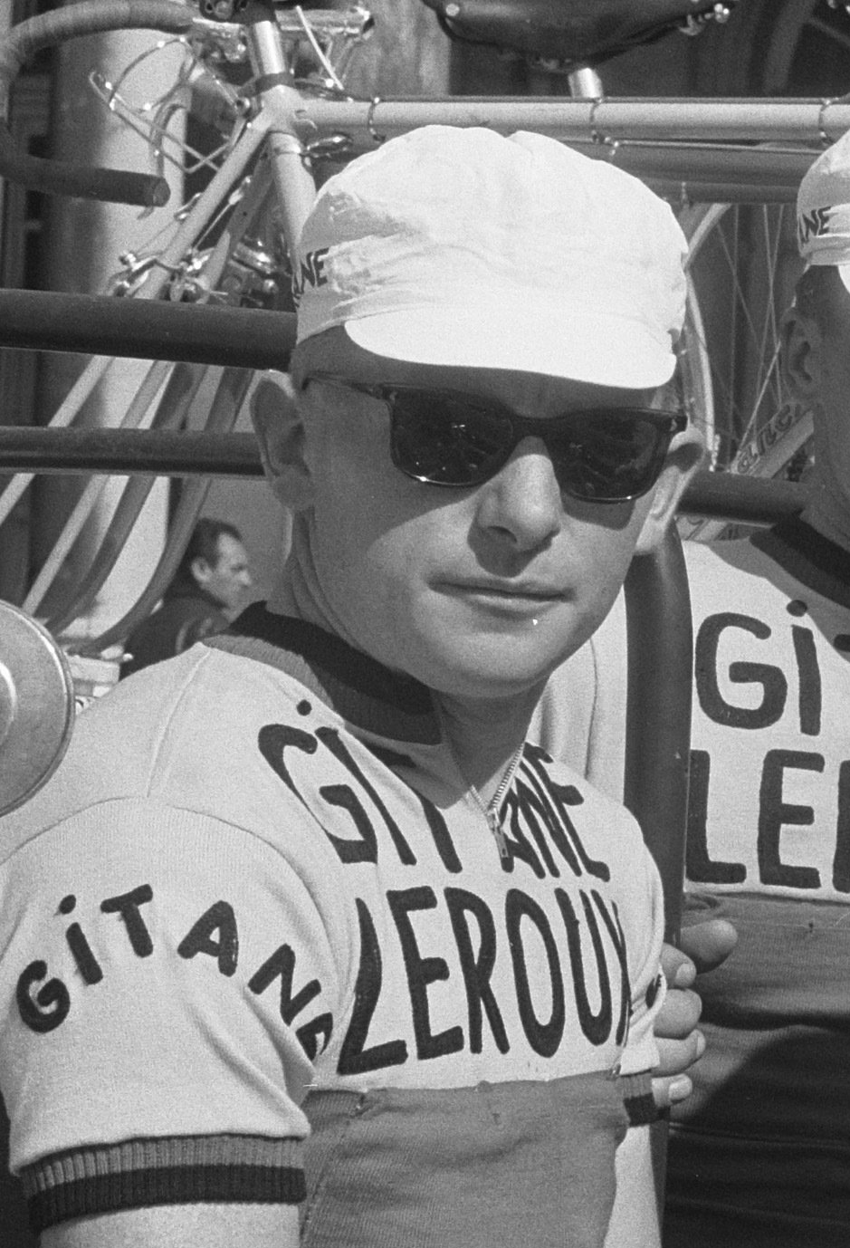 Tour de France 1962 , Ploeg Gitane Leroux.